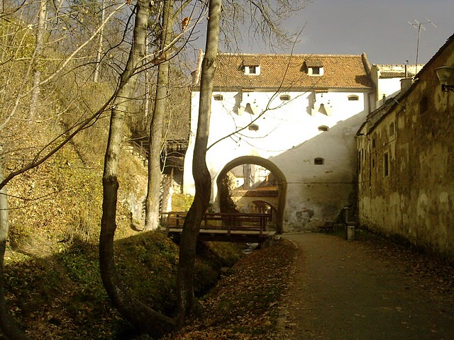 Alea "După Ziduri", Braşov